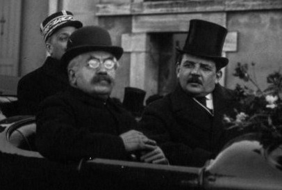 Visite à Lyon du président de la République française, Alexandre Millerand, aux côtés du maire de la ville, Édouard Herriot.